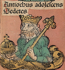 Зображення Антіоха VII у Нюрнберзькій хрониці.